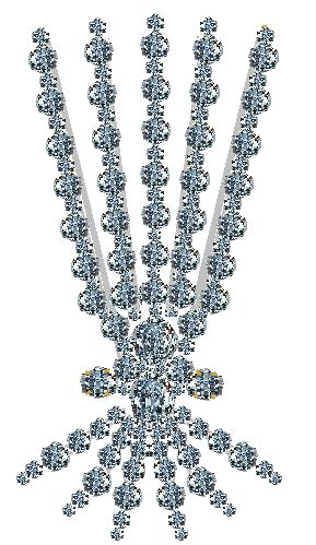 Chelenk, een Turkse aigrette, zoals Nelson die droeg.